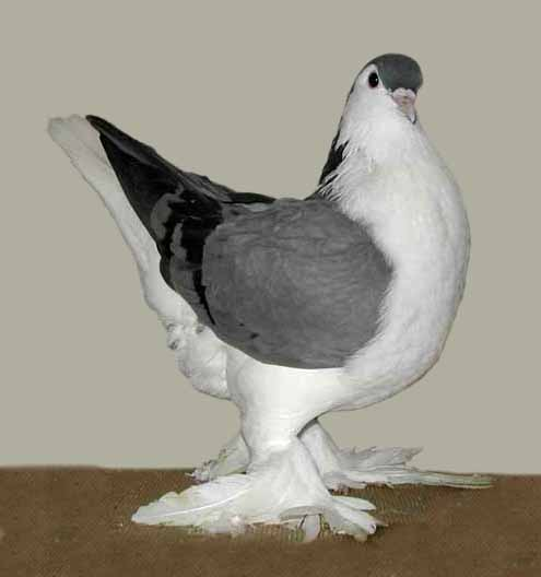 Lahore (Blue Bar)